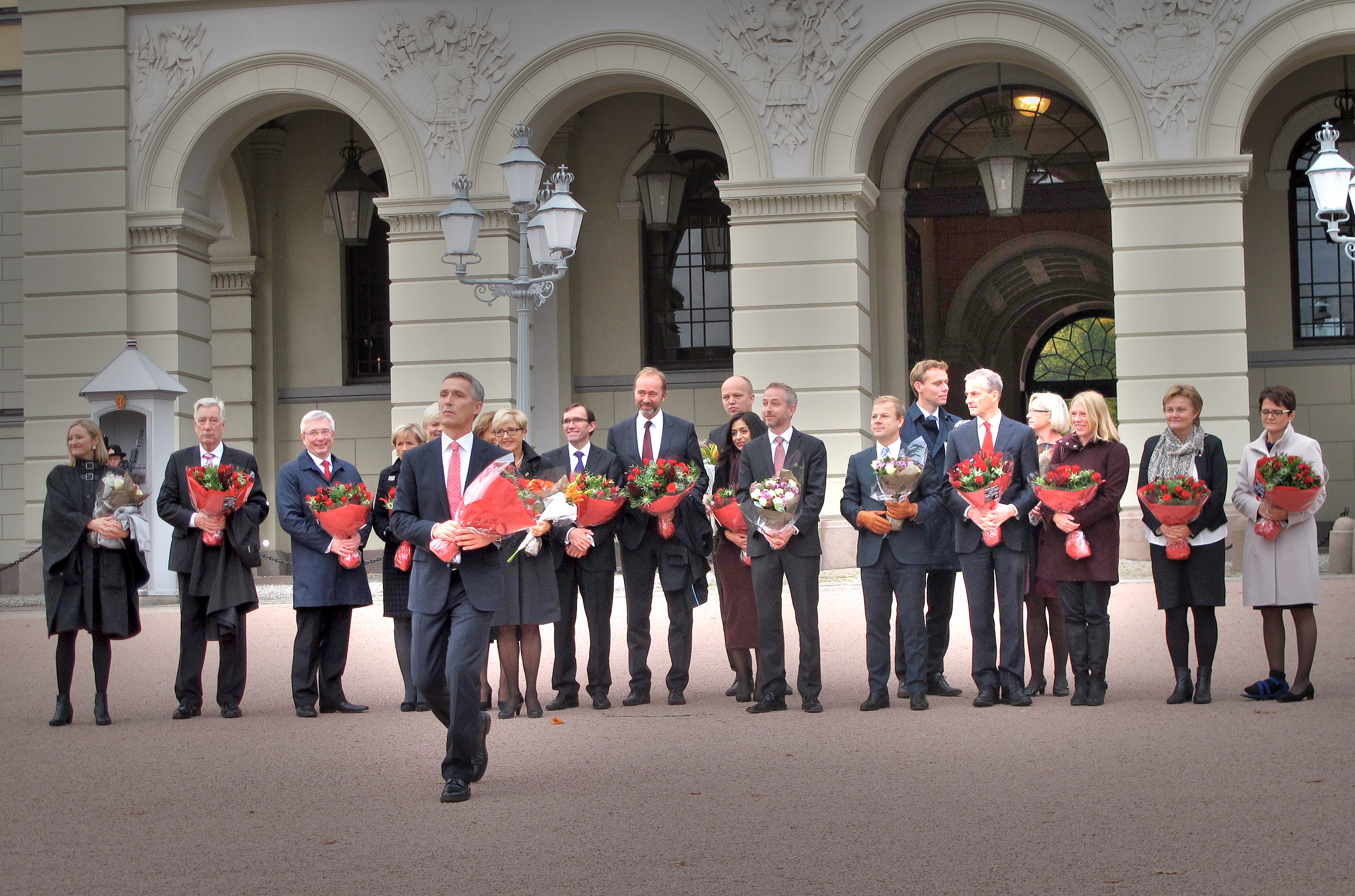 Stoltenberg's Second Cabinet